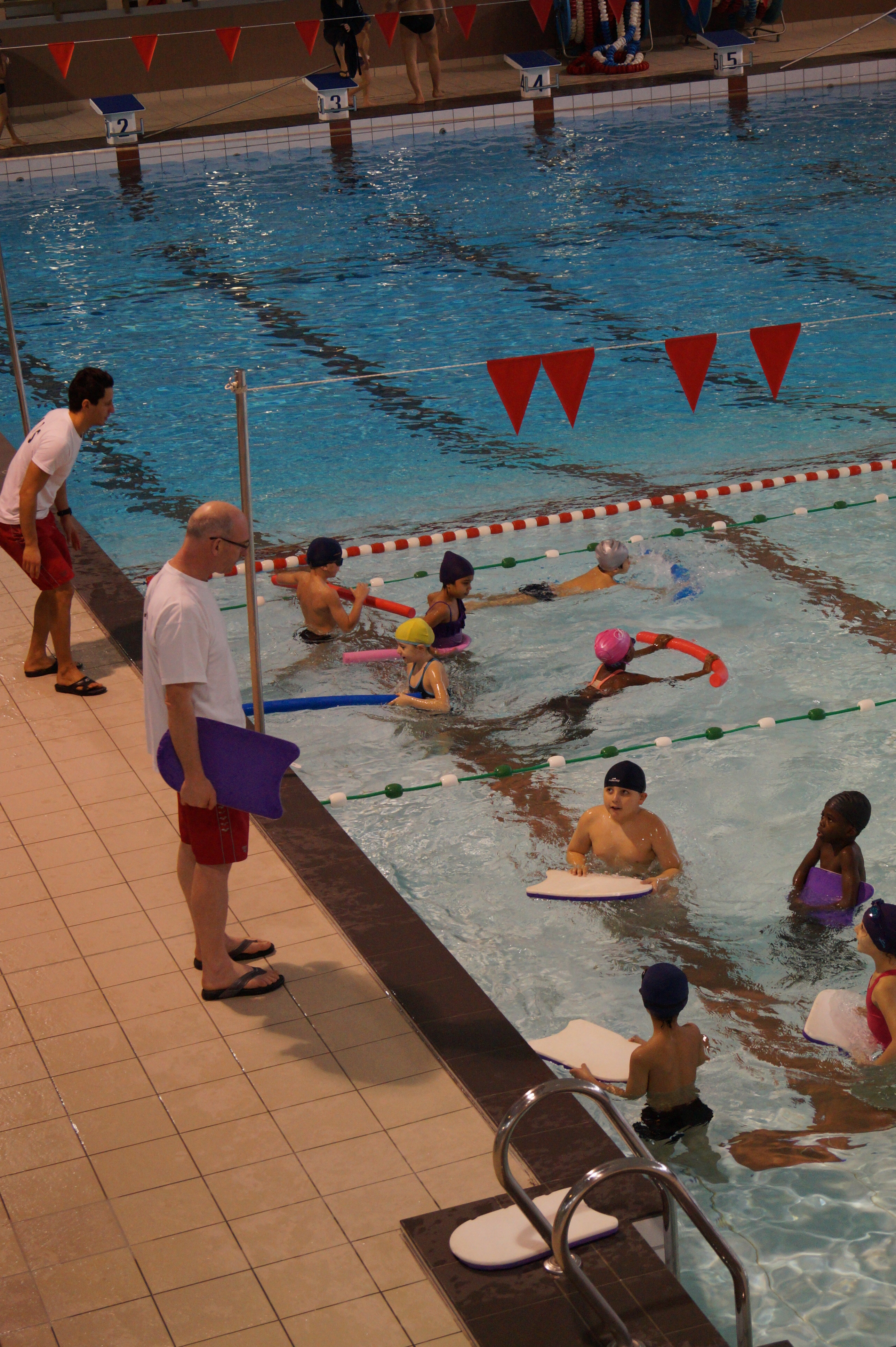 cohésion social sport